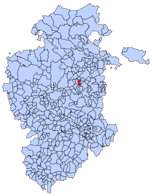 Cástil de Peones en Burgos